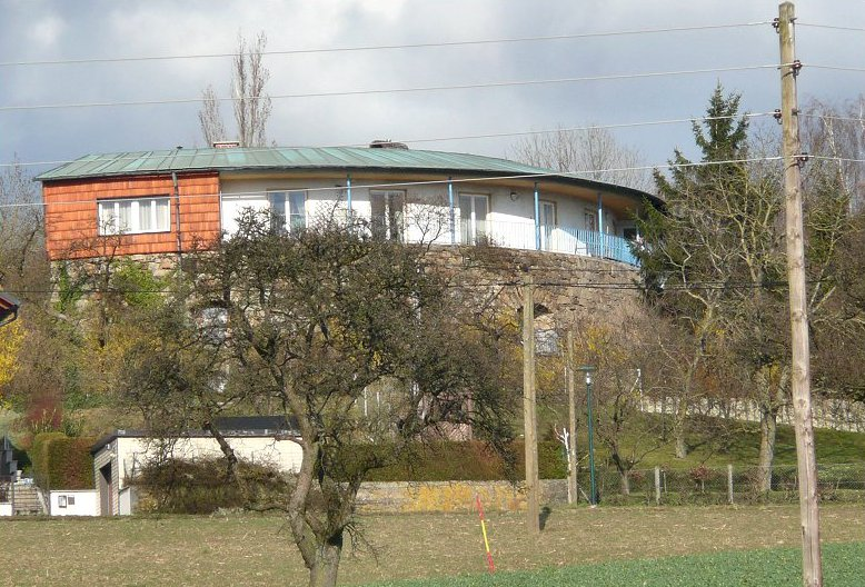 Turm 18 (Katharina) der Maximilianischen Turmlinie - Rückseite